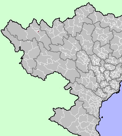 Lai Chau District, Lai Chau Province, Vietnam.